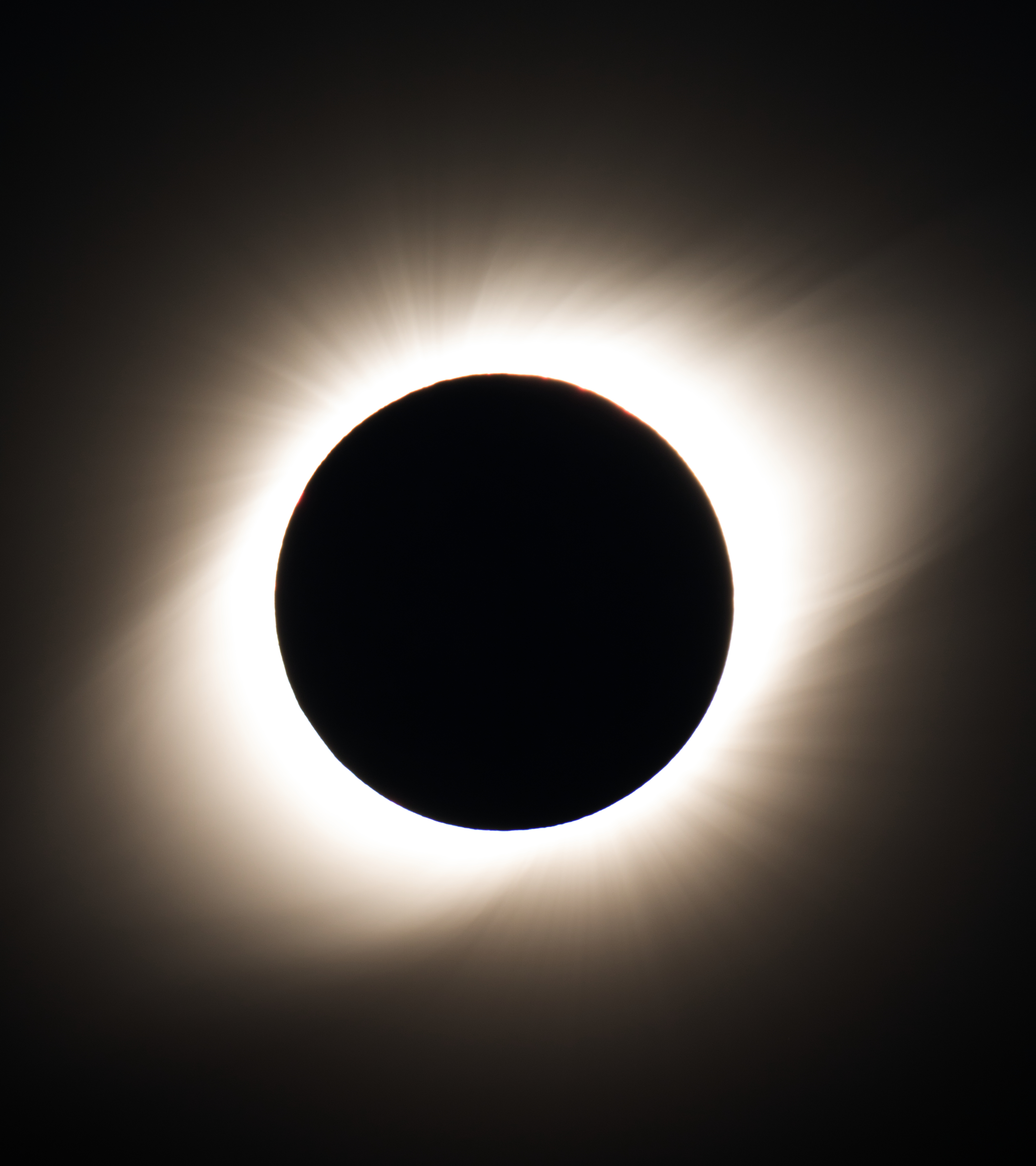 Corona solar. Eclipse total de sol 2019, Valle de Elqui. Chile. Autor: Luis Rojas.